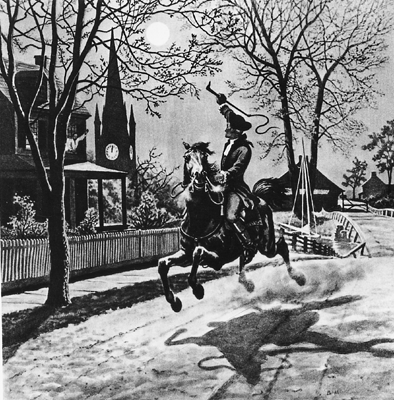 Paul Revere's midnight ride